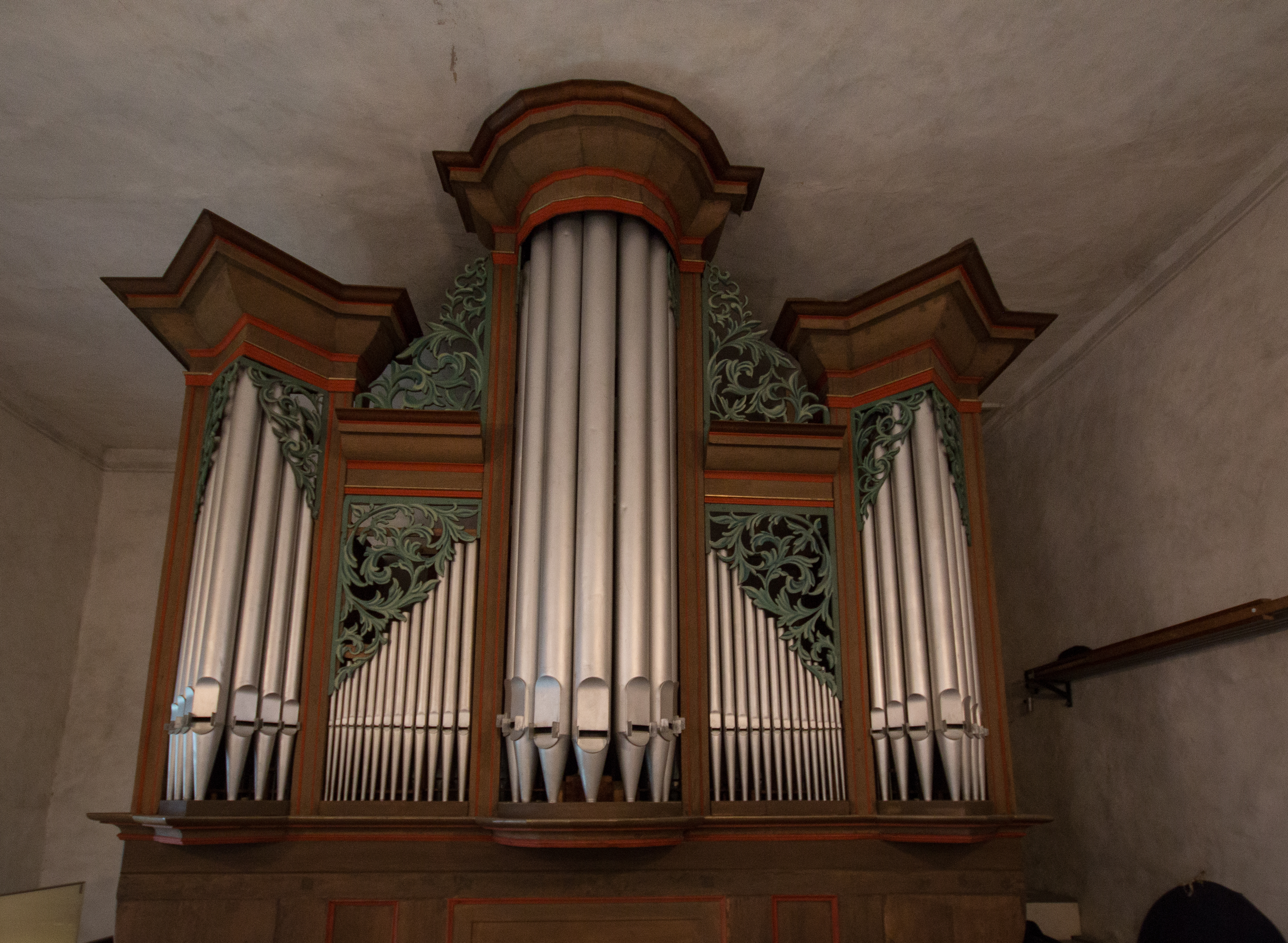 Orgel der evangelischen Kirche Treis an der Lumda von Förster & Nicolaus Orgelbau, errichtet im Jahr 1928